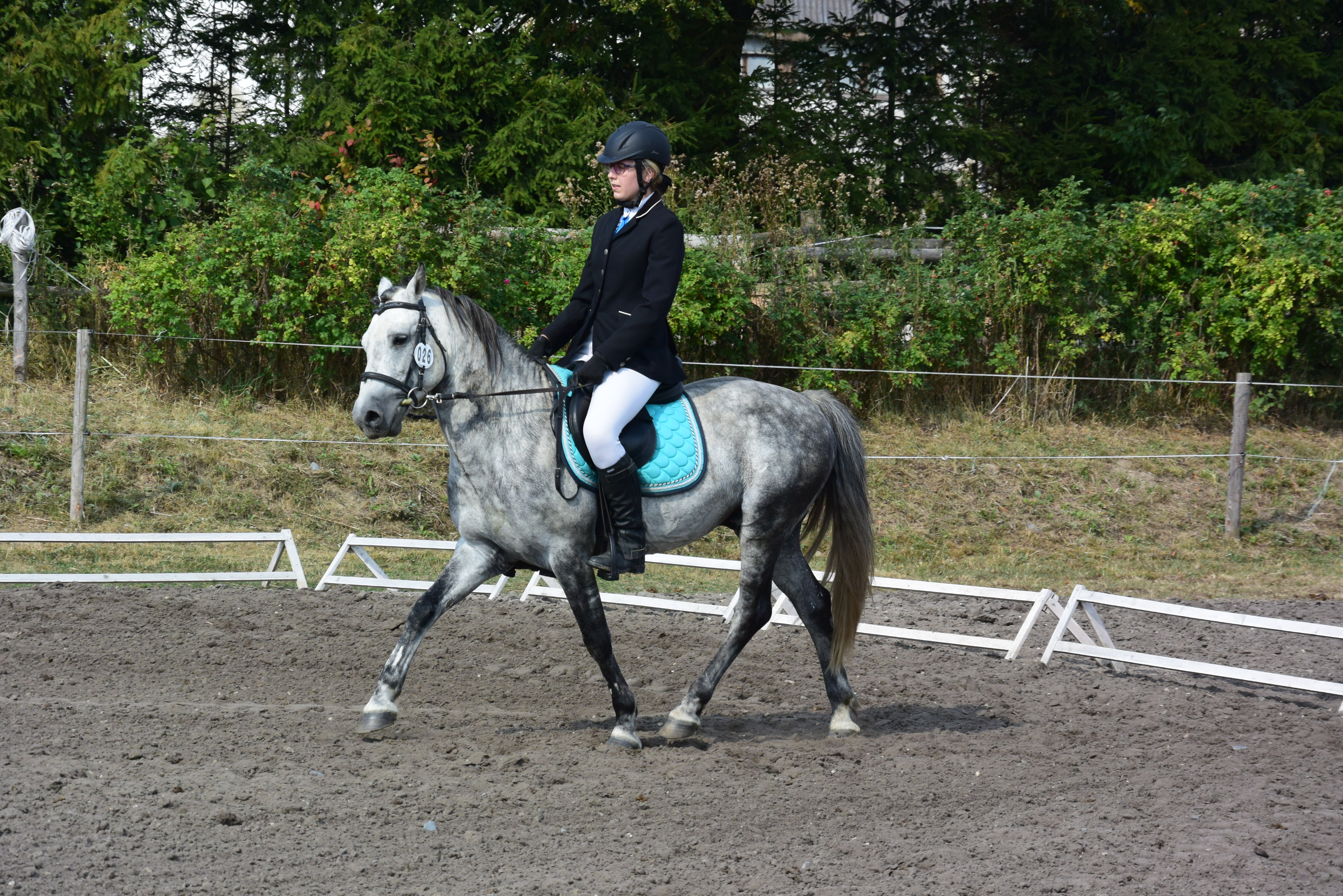 Tu Rudná pod Pradědem, RC